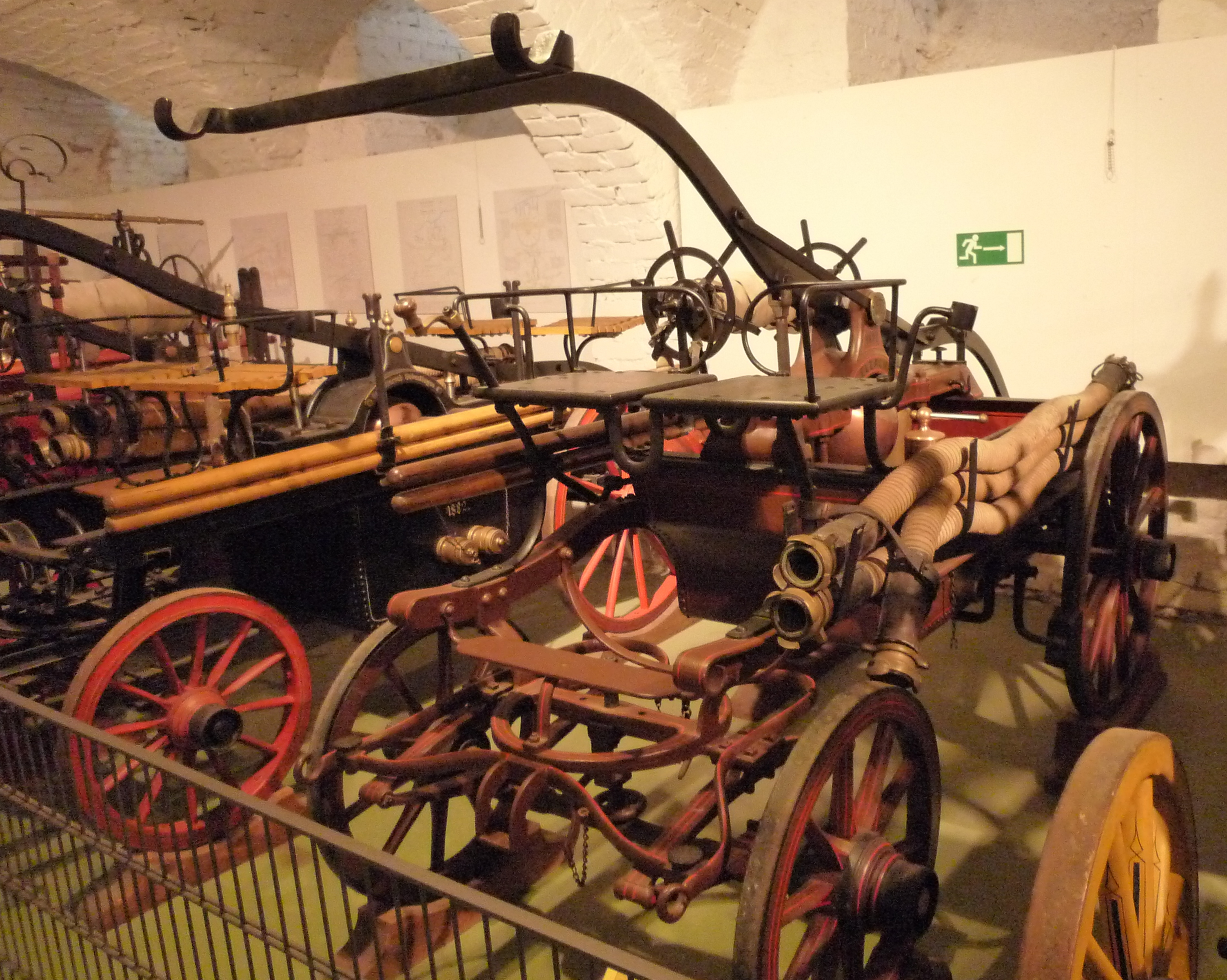 Pferdegezogene Handdruckspritze von Grether & Cie. aus Freiburg aus dem Jahr 1897 im Feuerwehrmuseum Salem. Zwei Zylinder mit einem Durchmesser von 100 mm und einer Hubhöhe 190 mm mussten hier von 11 Mann bedient werden.